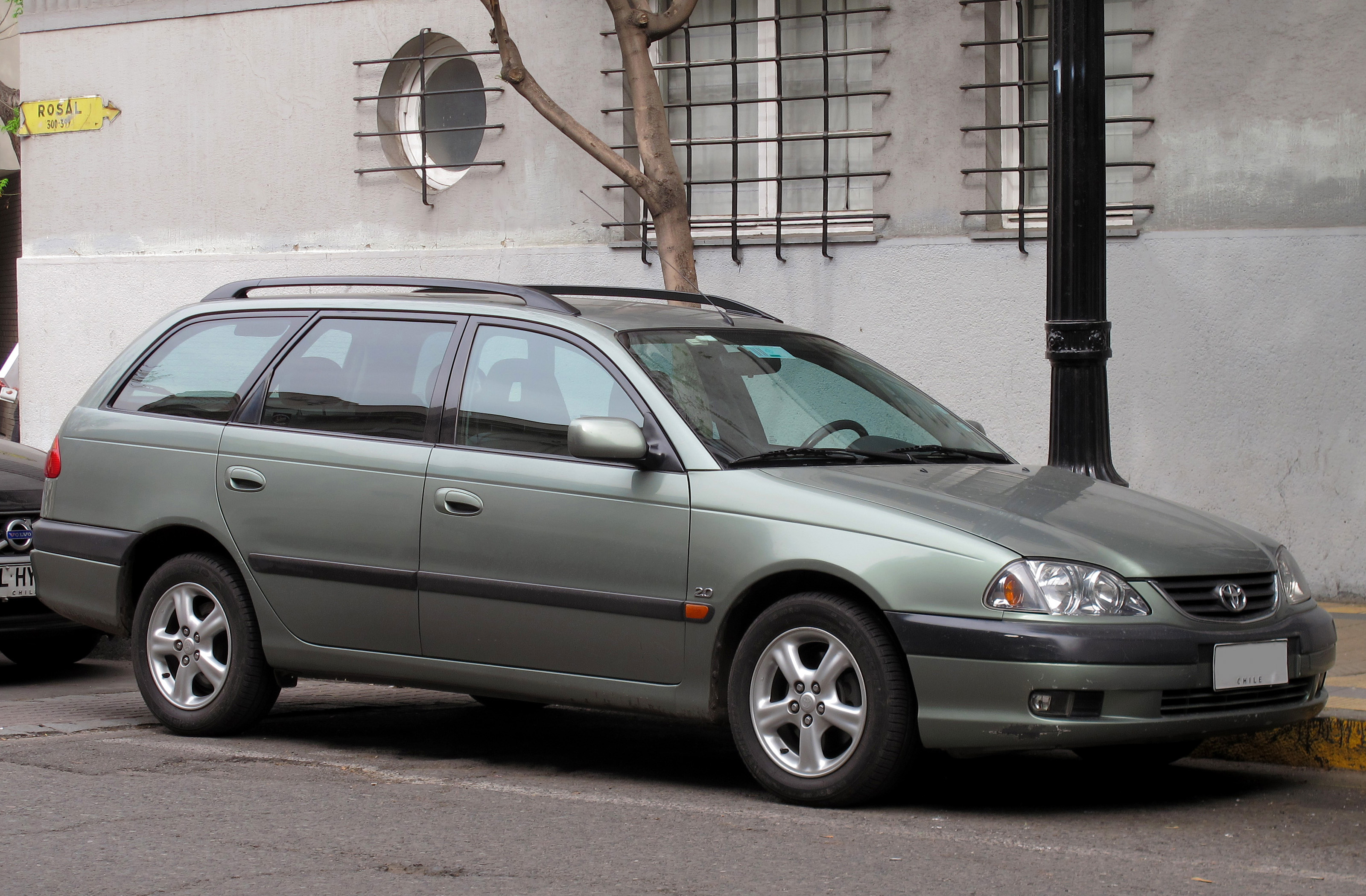 Toyota Avensis 2.0 LEi Wagon 2001